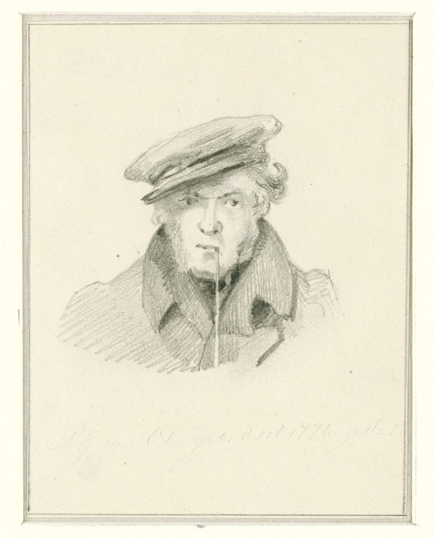 Self-portrait